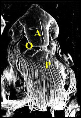 Rostre d' Araignée vue au microscope électronique à balayage